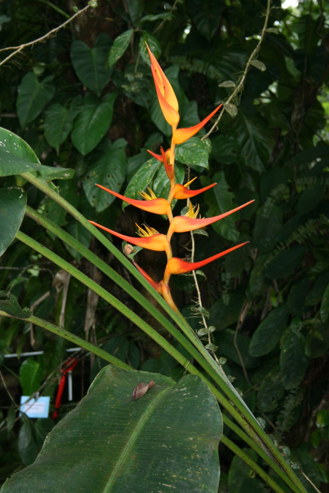 Heliconia latispatha, Heliconiaceae - Costa Rica: Prov. Puntarenas, La Gamba NW Golfito, "Tropenstation La Gamba"/"Estación Biológica La Gamba"